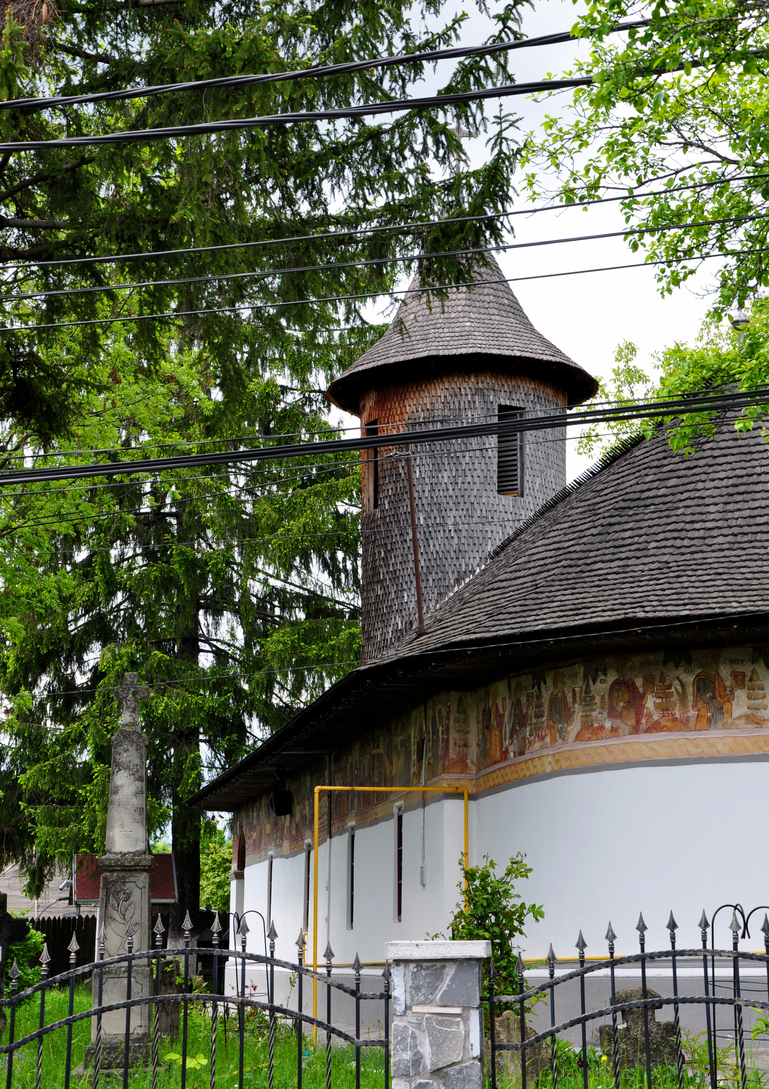 Biserica „Înălțarea Domnului” a fostului schit al lui Drăghici Spătarul din Cornu de Sus, construita in secolul al XVIII - lea, 1811 - 1835